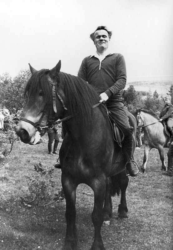 Beskrivelse: I privatarkivet etter Otto Johansen i Riksarkivet finner vi bilde av Erling Stordahl til hest under det første ride-og botaniseringskurs for blinde og døvblinde i 1964. Foto: Elisabeth Meyer, Oslo. Arkivreferanse: Riksarkivet, Privatarkiv 939 Otto Johansen, eske 3